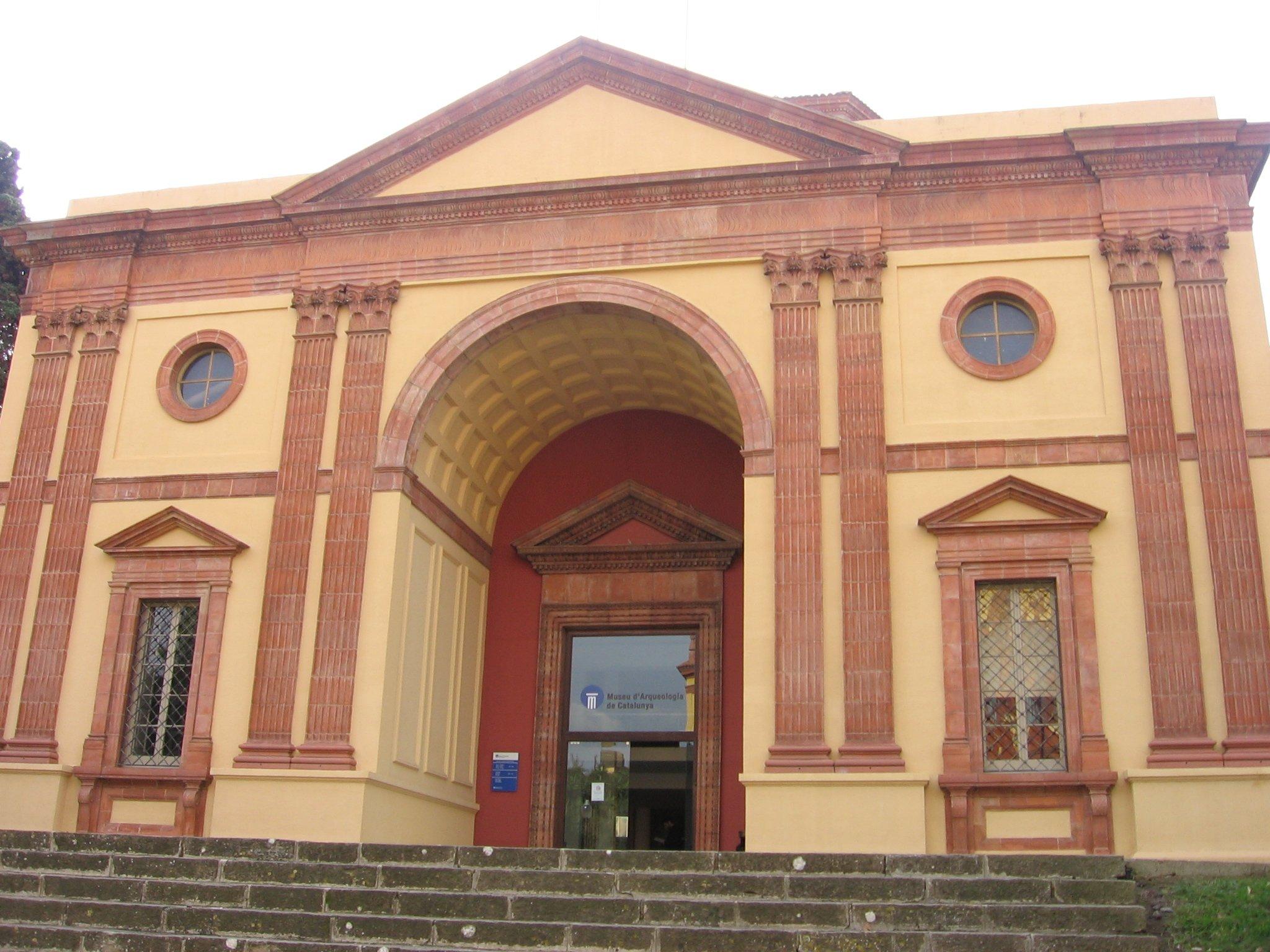 Palacio de las Artes Gráficas, actual Museo de Arqueología de Cataluña, Montjuïc (Barcelona)